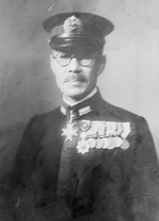 momiyama shigeyuki